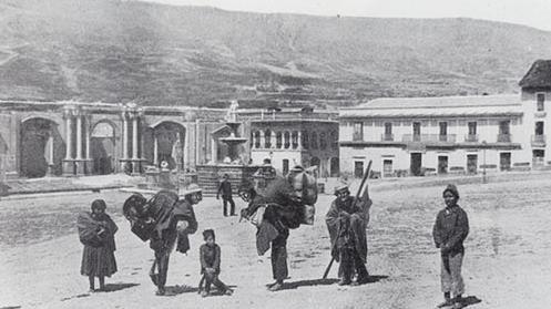 Museo Nacional de Arte, Catedral de La Paz, Casa Diez de Medina y Fuente de Neptuno. La Paz, Bolivia, 1860.